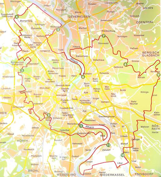 Verkleinerte Karte des Kölnpfades